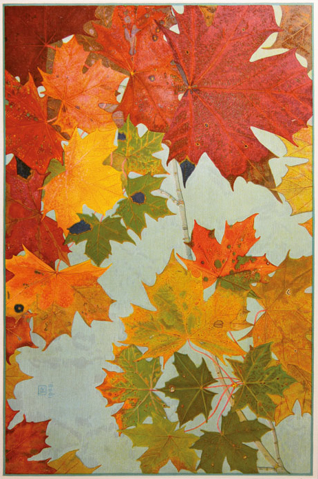 Farbtafel aus Feuilles d'automne. Neuchatel, Delachaux et Niestle 1909